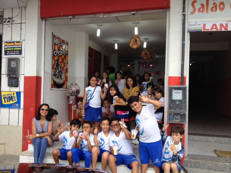 Alunos Escola Criação